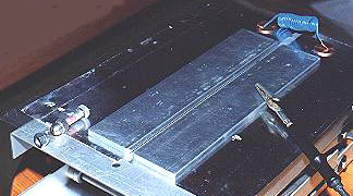 Aufbau eines N2-Lasers